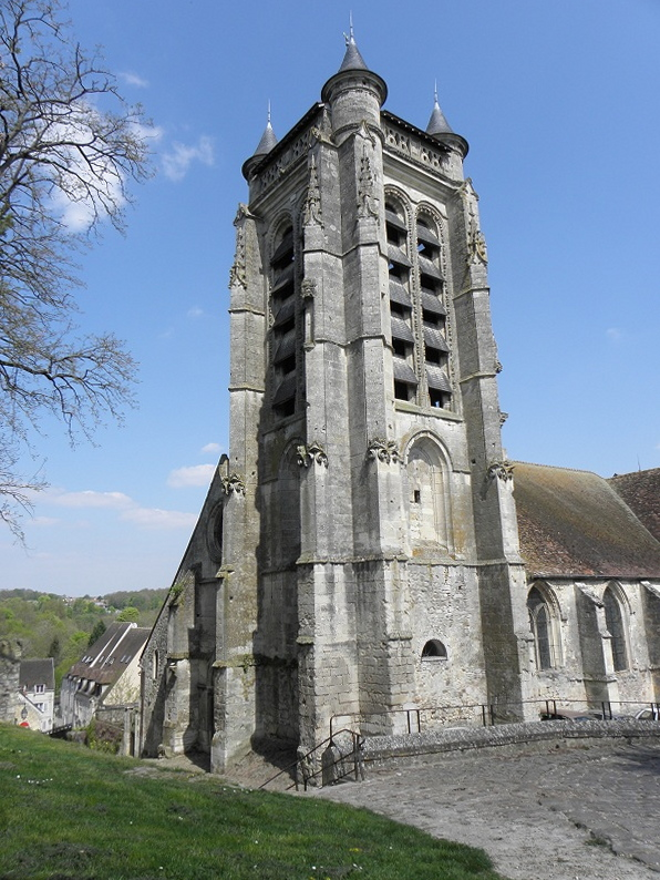 Église Notre-Dame de La Ferté-Milon (02).